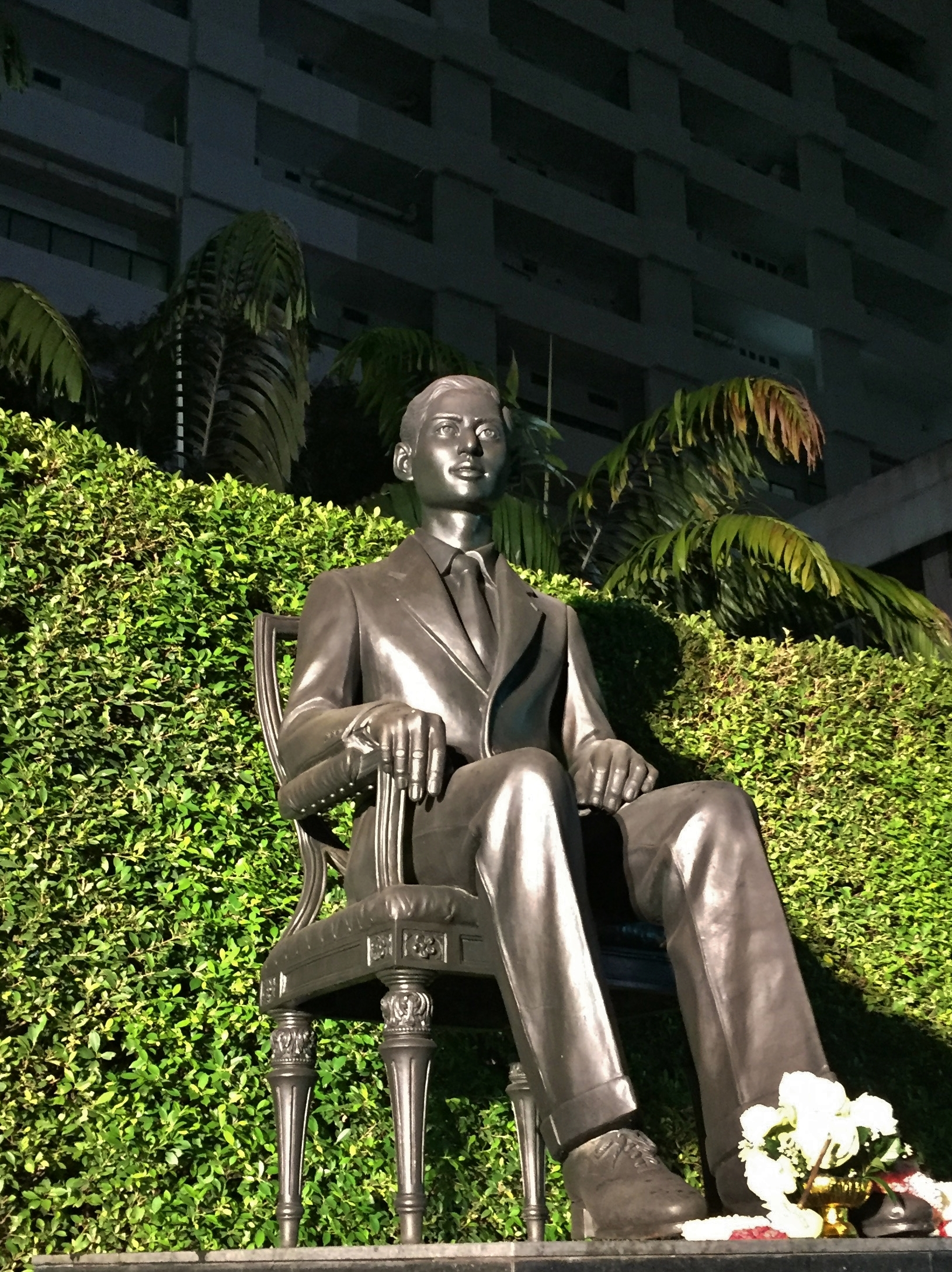 พระบรมราชานุสาวรีย์พระบาทสมเด็จพระปรเมนทรมหาอานันทมหิดล พระอัฐมรามาธิบดินทร ในคณะแพทยศาสตร์ จุฬาลงกรณ์มหาวิทยาลัย ถ่ายในเวลากลางคืน